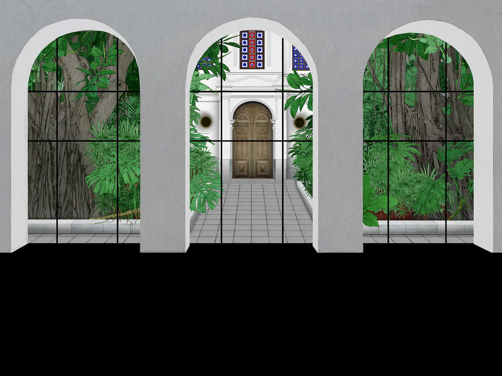 Dibuix del pati interior del Centre Beneficència de València, seu del Museu Valencià d'Etnologia